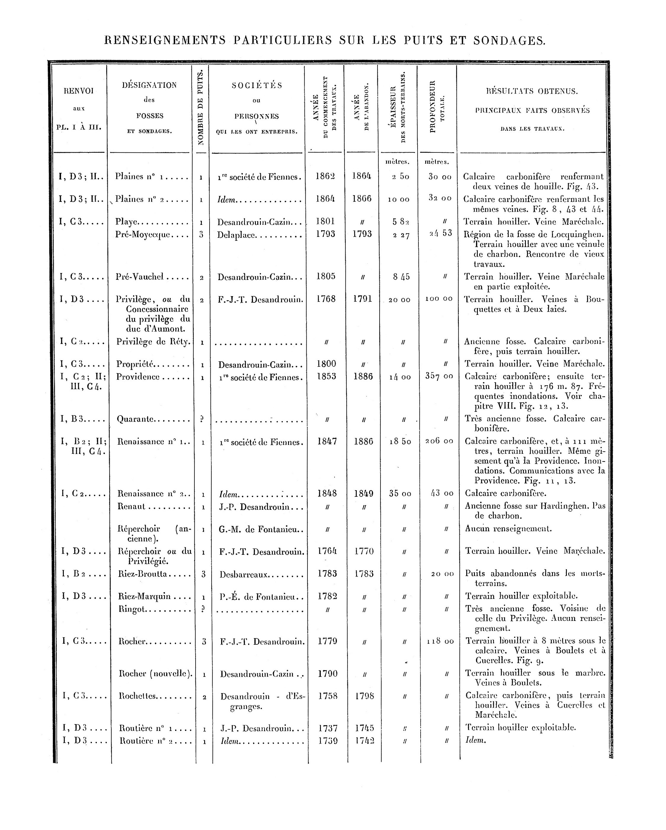 Liste des puits de mine et des sondages. Mines du Boulonnais. Document extrait de Étude des Gîtes Minéraux de la France. Topographie Souterraine du Bassin Houiller du Boulonnais ou Bassin d'Hardinghen, par A. Olry, ingénieur en chef des Mines. Chapitre IX, pages 172 à 189.